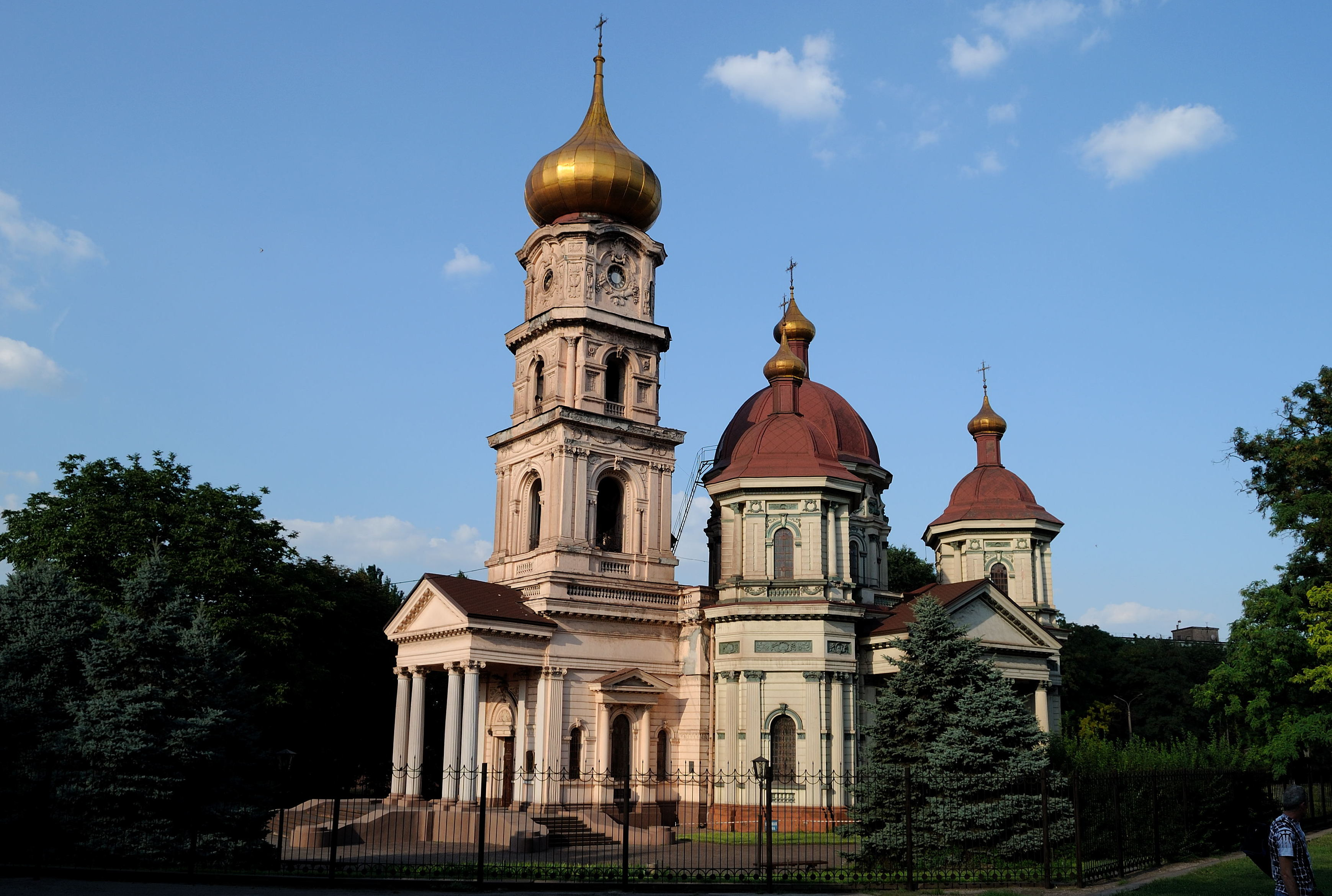 Брянська Миколахвська церква (мур.), Дніпропетровськ, пр.Калініна, 66